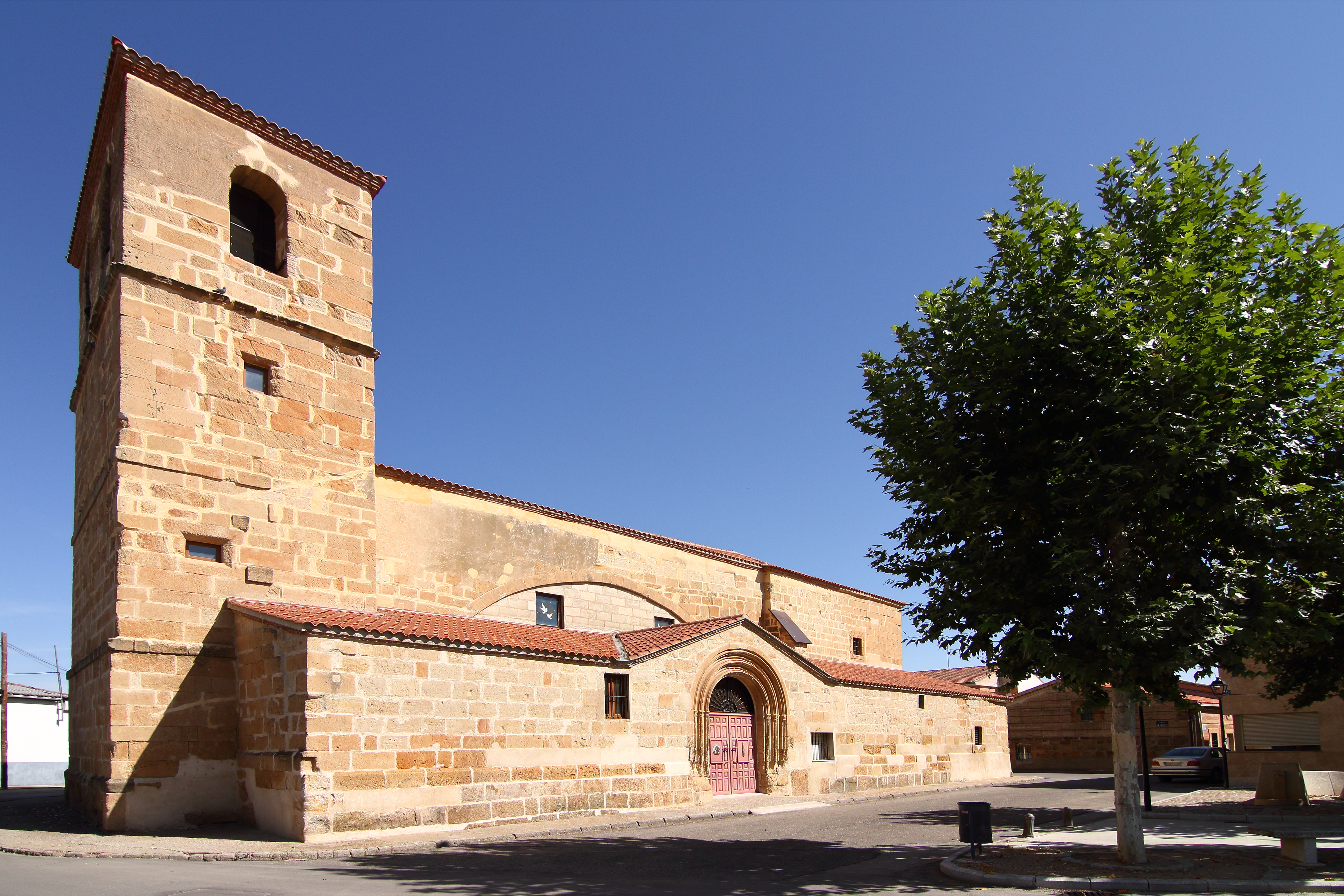 Iglesia parroquial de Huerta